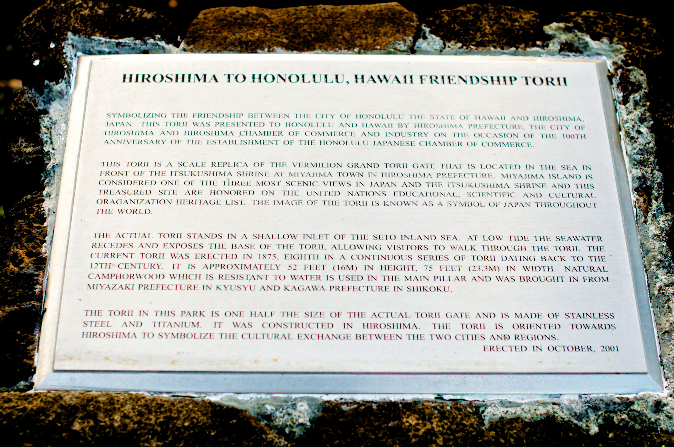 Plaque explaining the impetus for erecting the Itsukushima replica torii in Honolulu, Hawaii